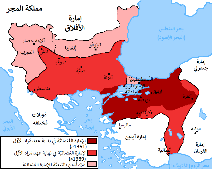 خارطة تُظهر تبدُّل حُدود الدولة العُثمانيَّة خِلال عهد السُلطان مُراد الأوَّل: عند جُلُوسه على تخت السلطنة وعند وفاته بعد أن فتح الكثير من البلاد.